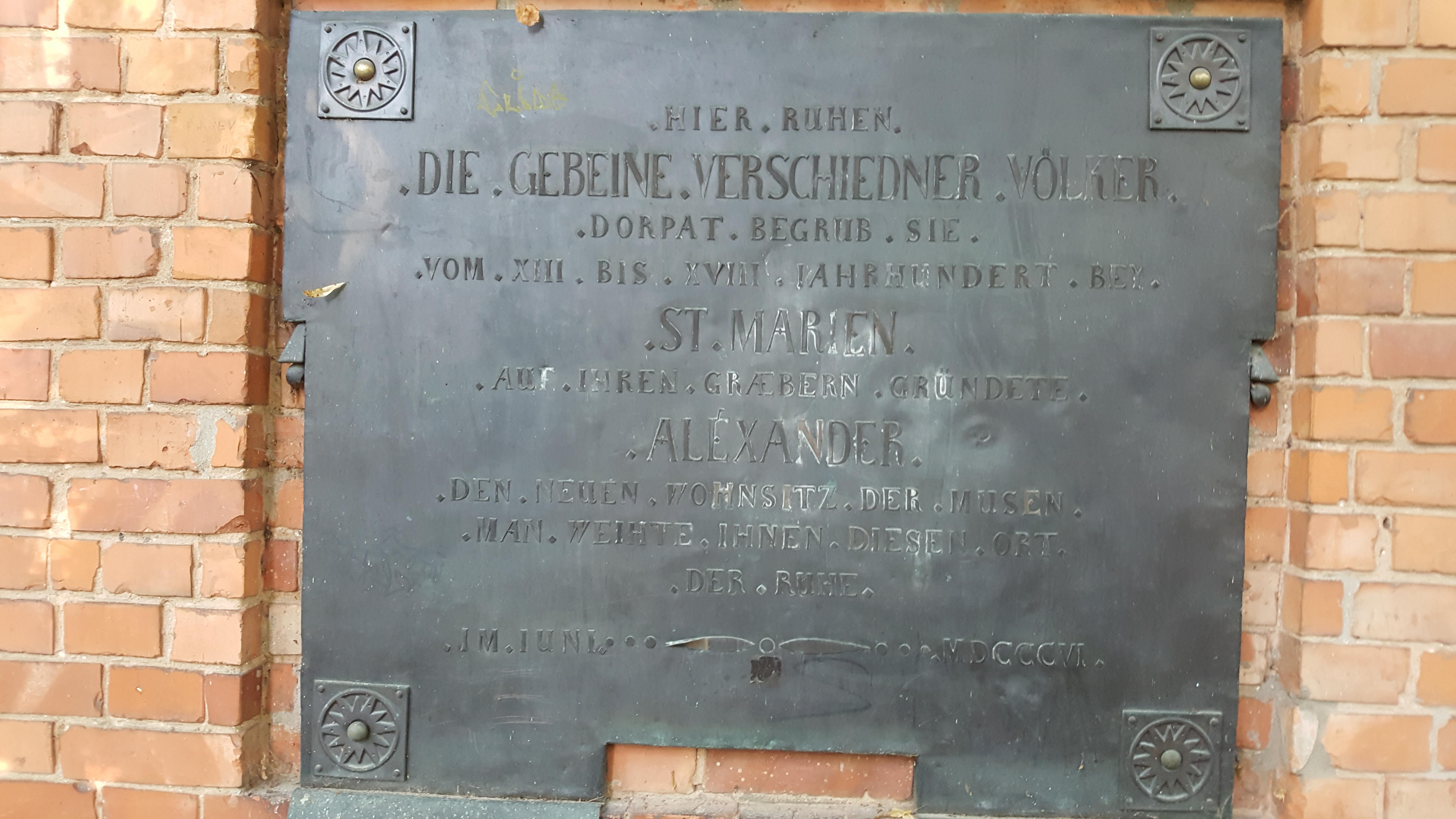 Tablica Rahvaste mälestussammas w języku niemieckim.